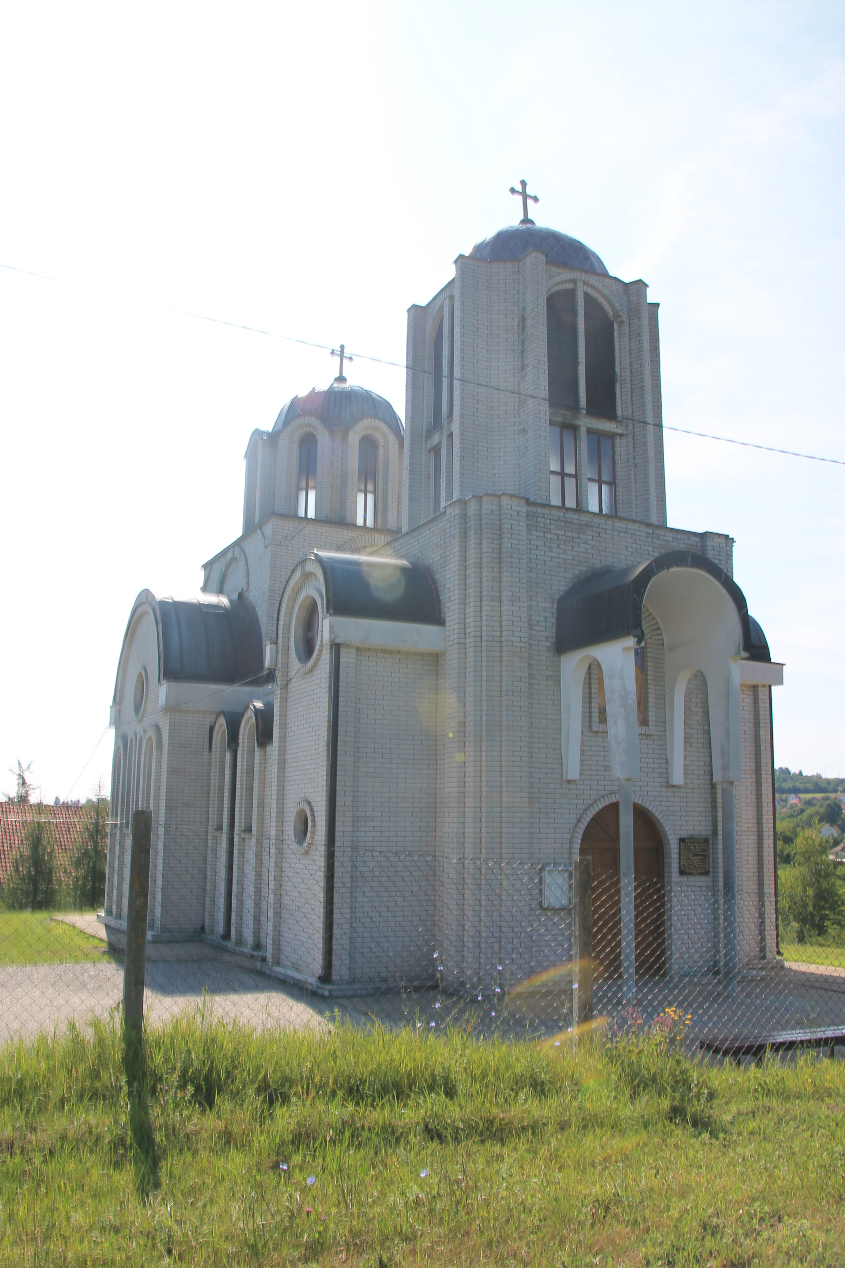 Crkva Sretenja Gospodnjeg (Ralja)